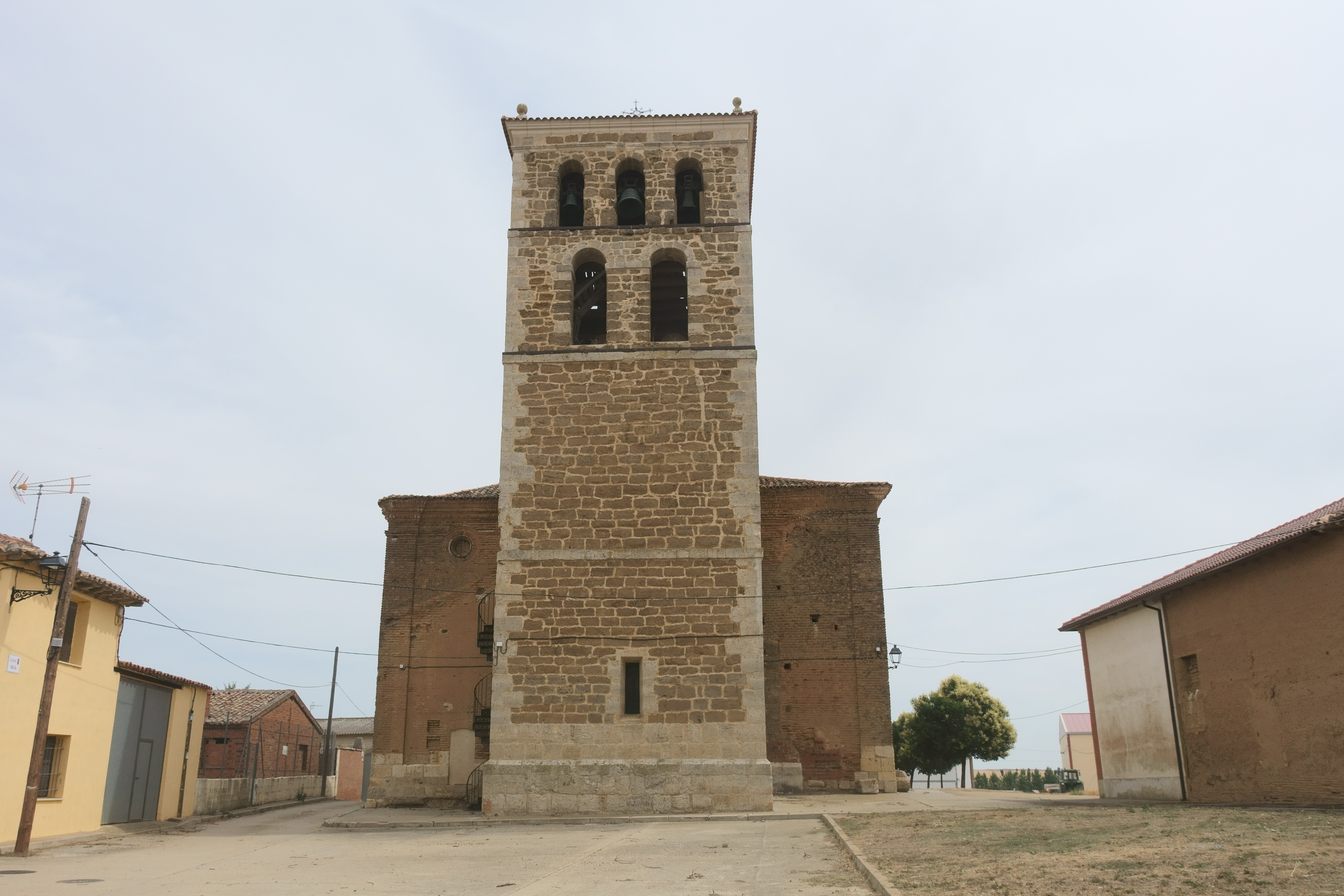 Iglesia de San Miguel, Villalumbroso (Palencia, España).